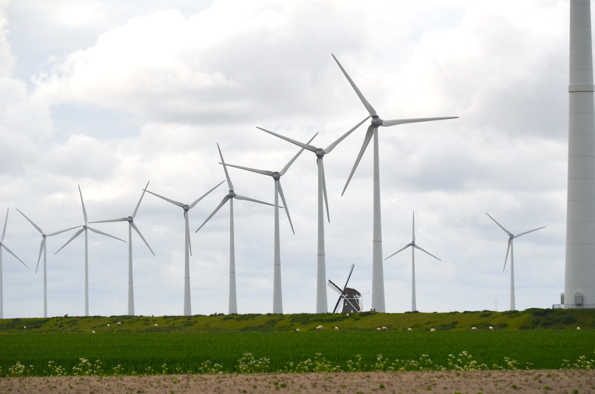 Historische windmolen tussen Windturbines bij de Eemshaven. Foto: Erik Swierstra.